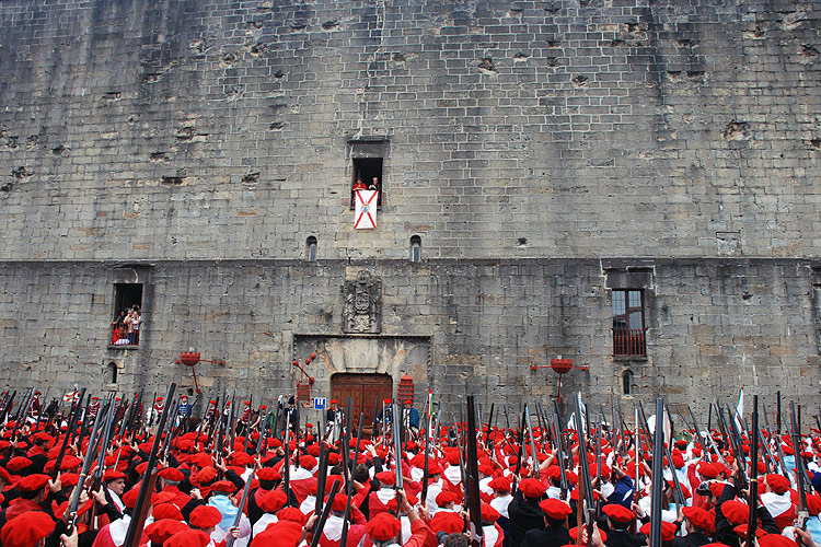 Castillo de Carlos V en Hondarribia, ahora Parador Nacional, durante el Alarde.